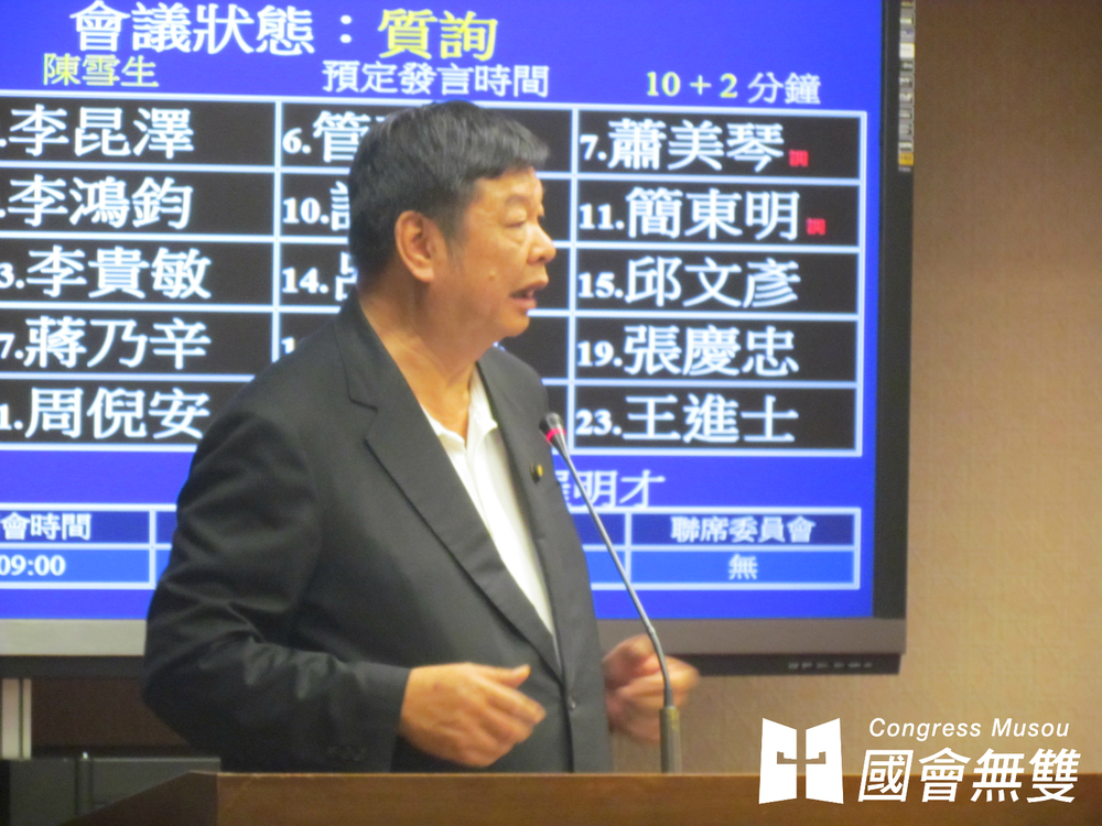 中文（台灣）: 面對民進黨立委葉宜津以保障國人旅遊品質為由要求減少連續假日中國團人數，國民黨立委陳雪生（圖）大力反對，甚至說出「反正我們也很少出門」。